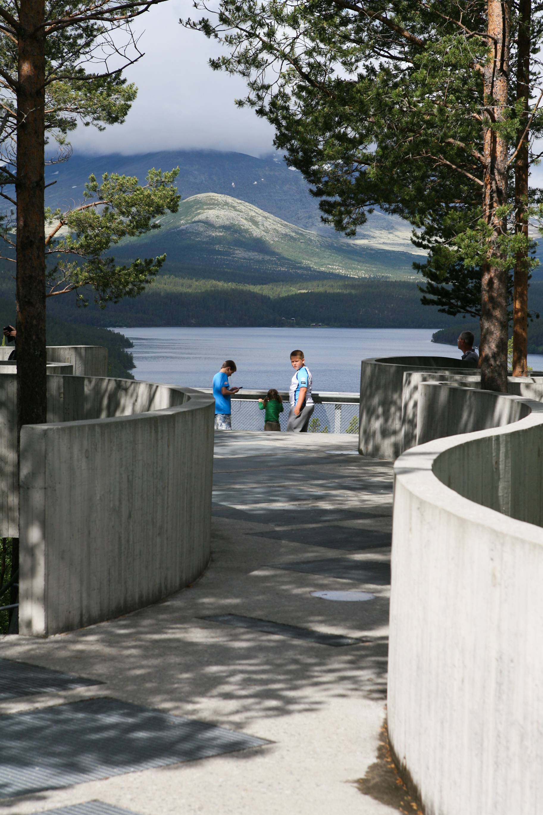 Sohlbergplassen ved fylkesveg 27 ved Stor-Elvdal/Sør-Fron.